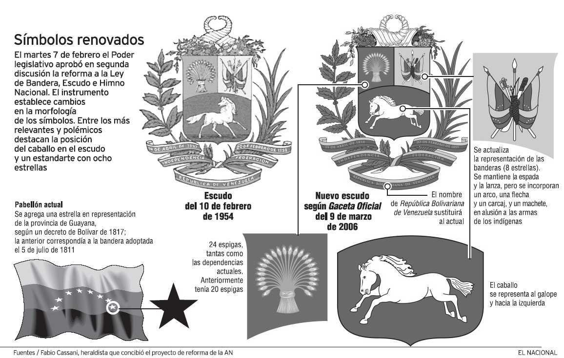 Explica los cambios en el nuevo escudo de armas de Venezuela aprobado en 2006